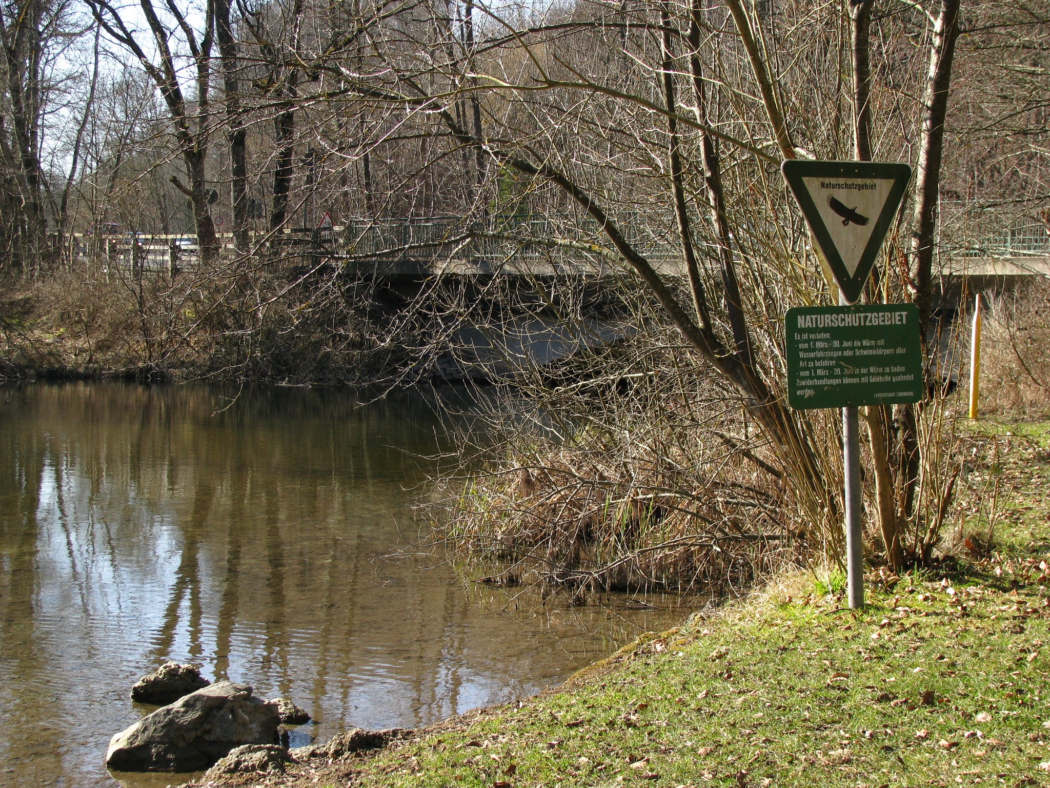 Die Würm an der Brücke bei Leutstetten, die dort das Naturschutzgebiet Leutstettener Moos begrenzt.